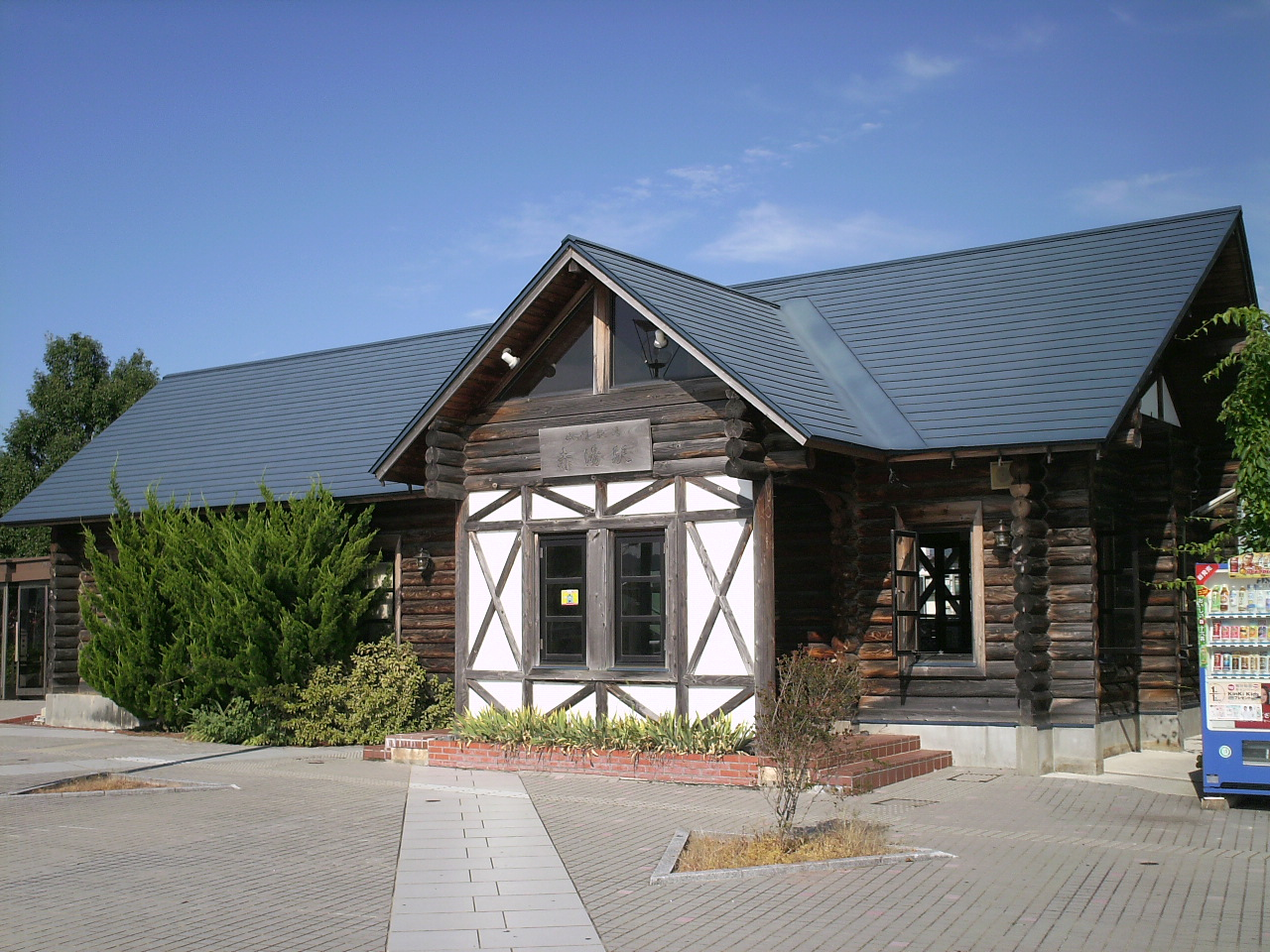 Akayu Station West Gate.